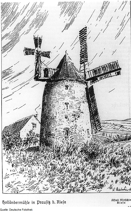 Original image description from the Deutsche FotothekHirschstein-Prausitz. Holländermühle, aus: Bunte Bilder aus dem Sachsenlande 1927